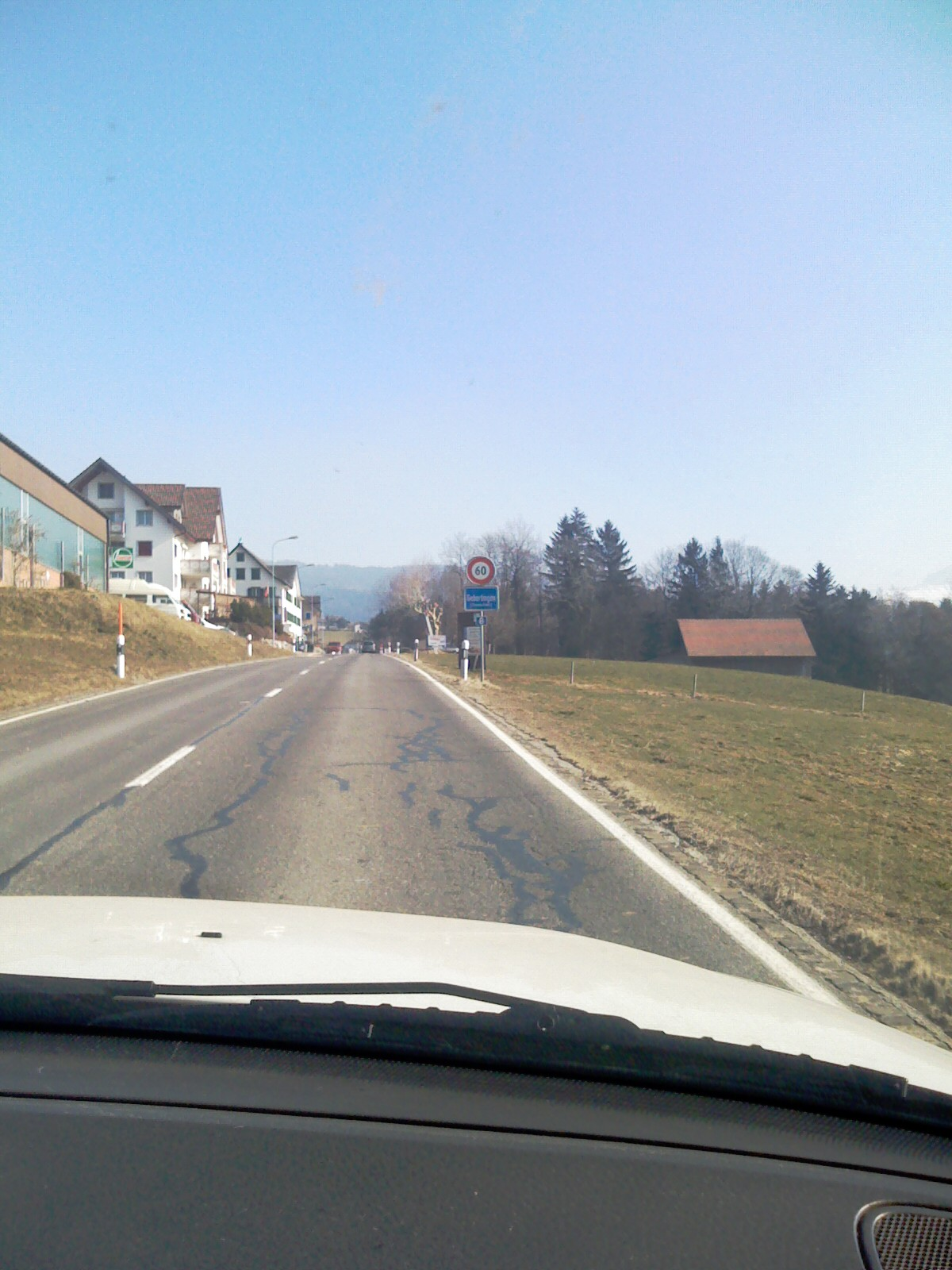 Gebertingen (Ernetschwil), See-Gaster, Canton of St. Gallen, Switzerland - municipo Gebertingen en la komunumo Ernetschwil, elektodistrikto See-Gaster, Svislando